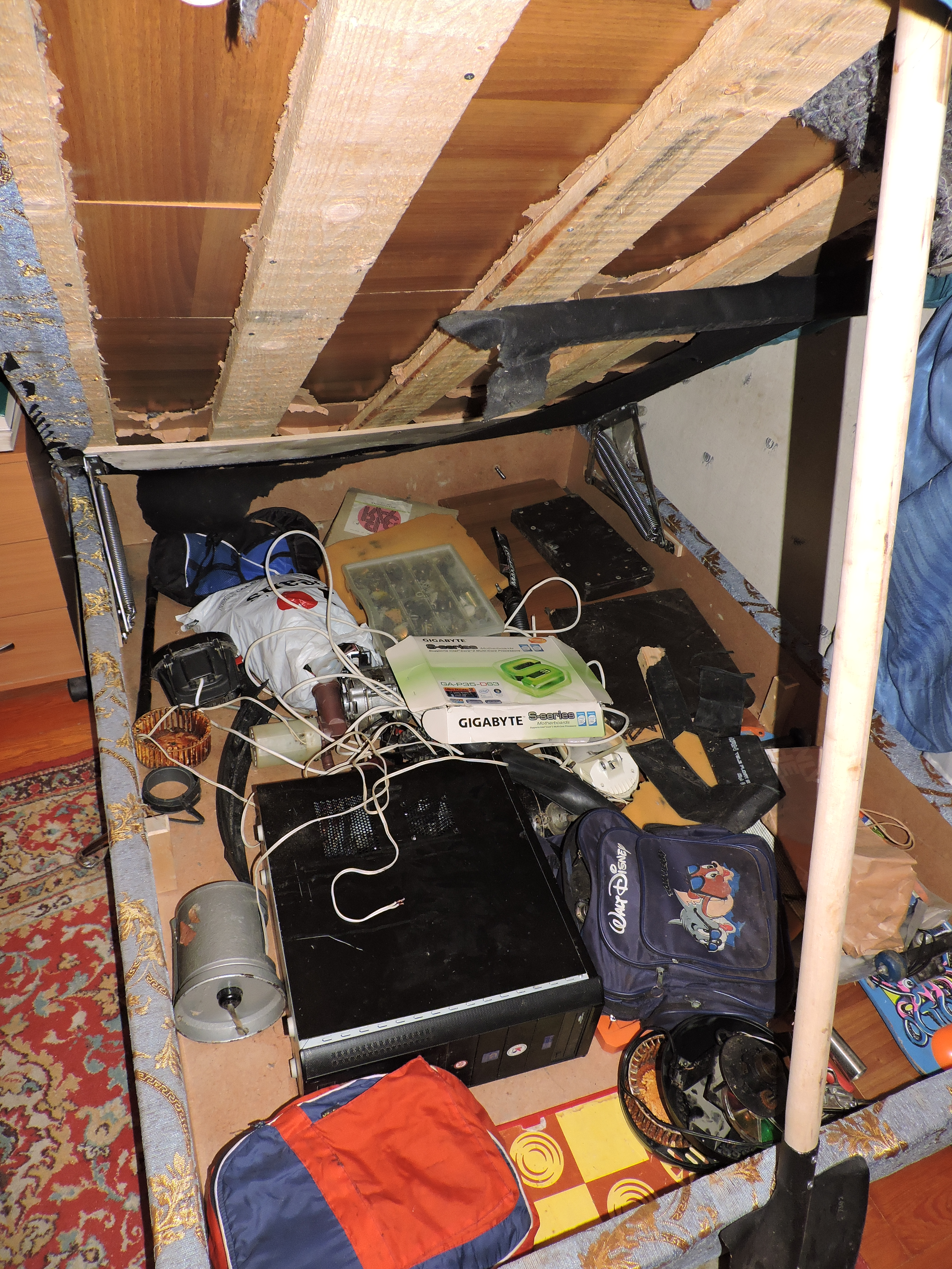 Бельевой ящик тахты часто используется для хранения никому не нужного хлама!